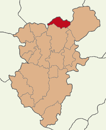 Bekilli ilçesinin konumu